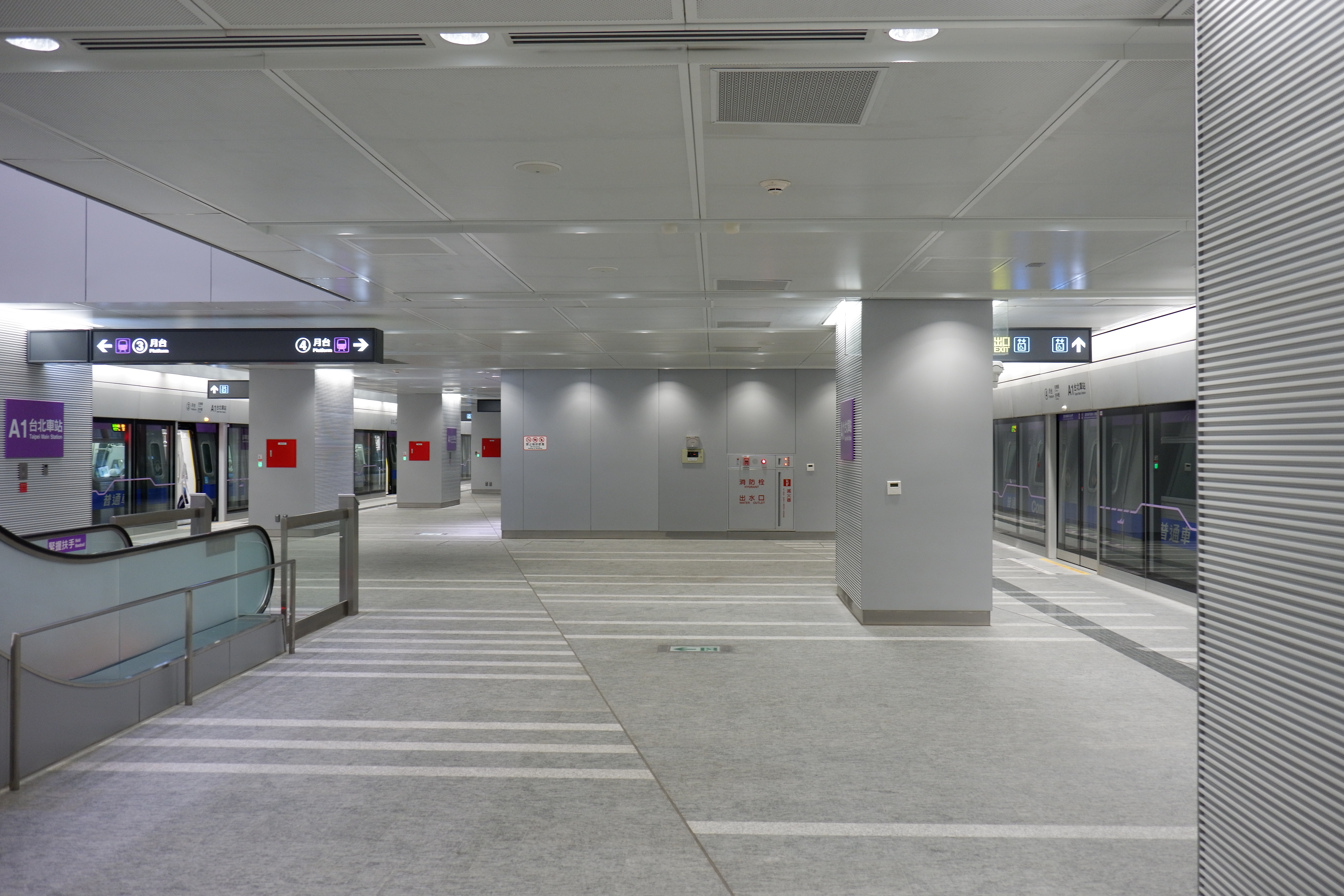 桃園捷運台北車站第三月台（左）與第四月台（右）。